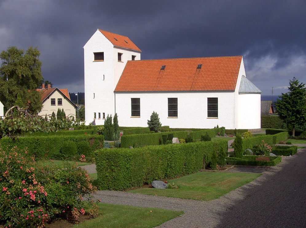 fra syd